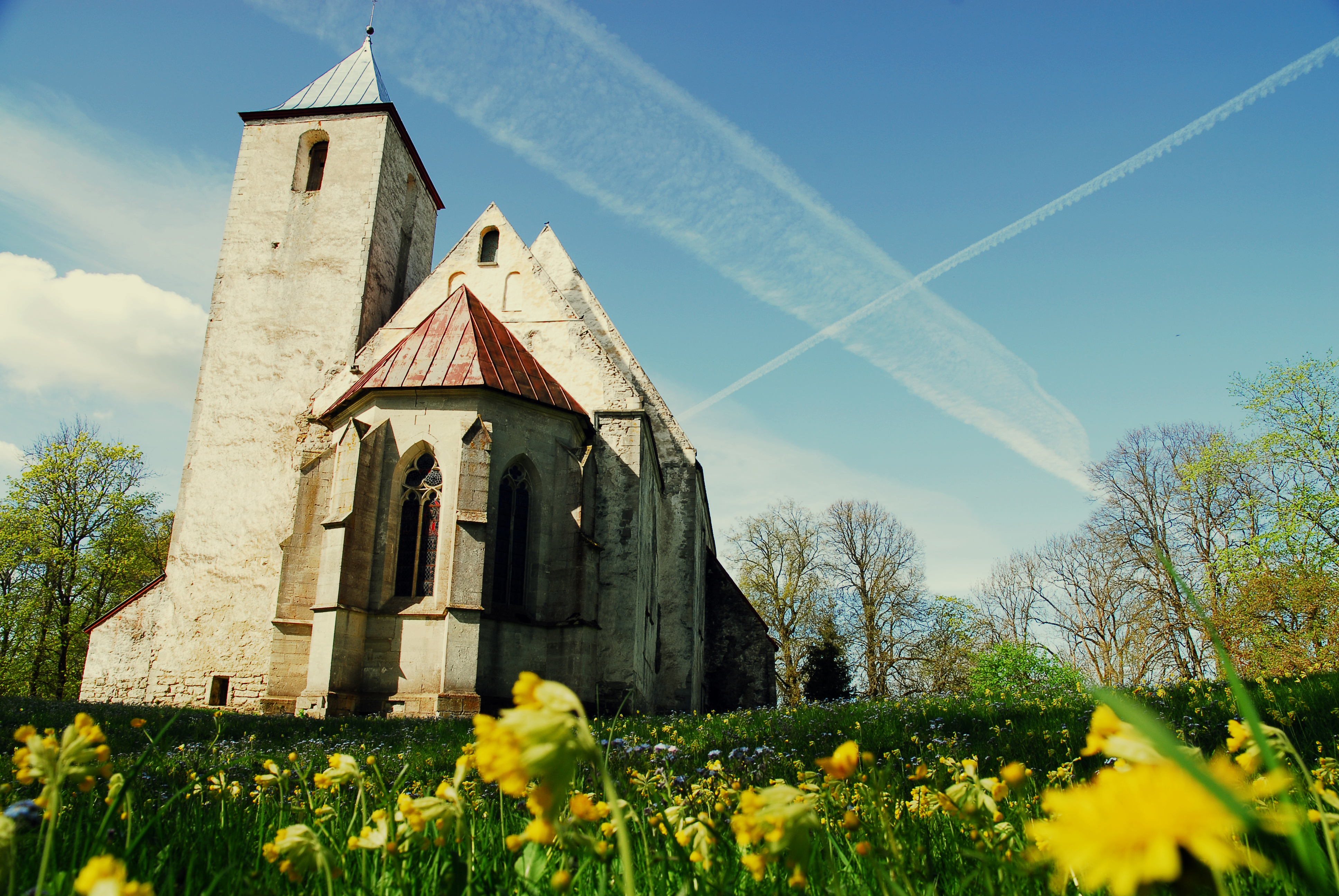 Valjala kirik